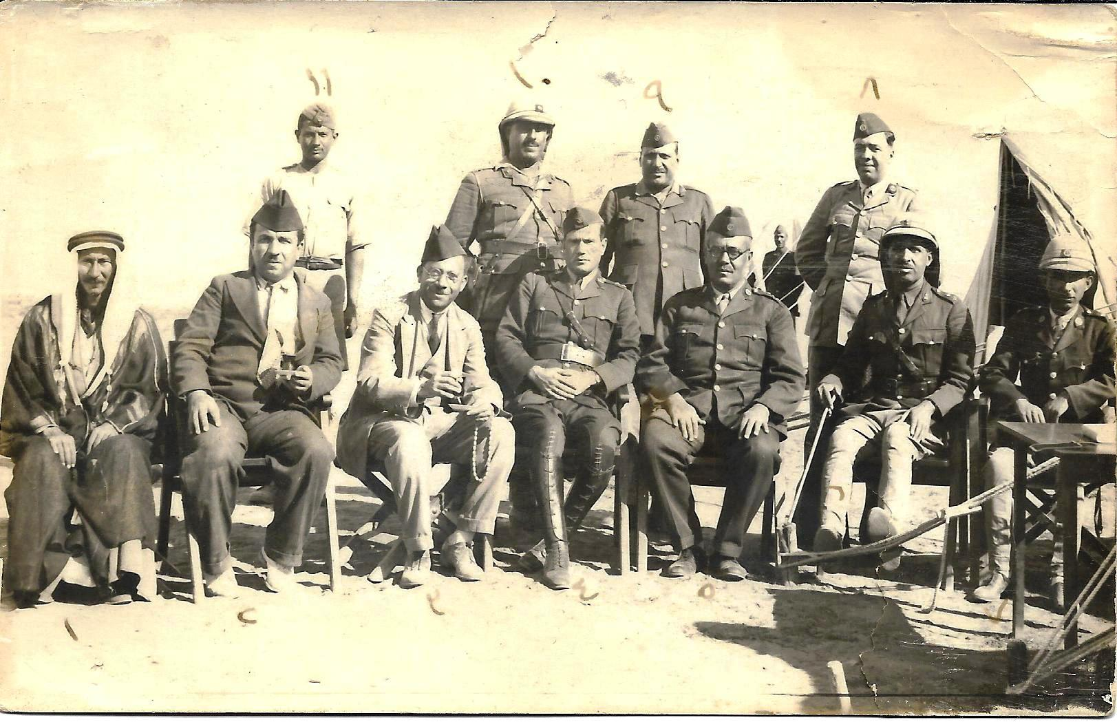 صورة التقطت في شمال العراق اثناء الحركات العسكرية عام 1935، في منطقة سنجار عند العودة إلى التمارين العسكرية في قرية كوهيل، الجالسون في الصورة من اليسار: شيخ بركات، صالح زكي آل شاكر، ،بطرس الكاتب، جلال ضابط مفرزة النقل الآلية، آمر مستشفى الميدان العقيد ضياء محمود بك، مقدم محمود الشهواني، الملازم الأول الصيدلي رؤوف. الواقفون من اليمين: الملازم الأول الصيدلي عبد الجبار آصف قاسم أغا الموصلي، النائب الضابط سيد نوري، الملازم الأول عبد النافع، جندي جمعة.